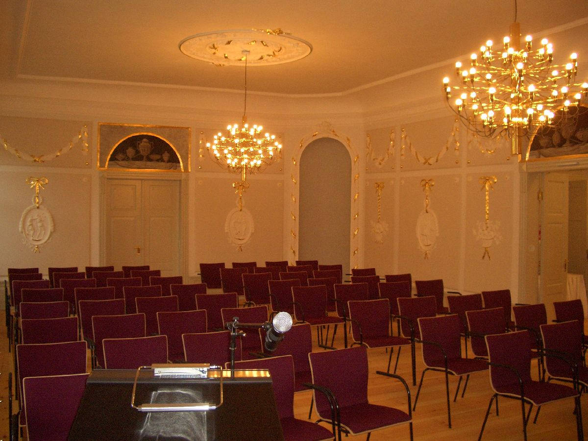 Festsaal der Alten Schule in der Langen Straße 41, Güstrow (Mecklenburg-Vorpommern).